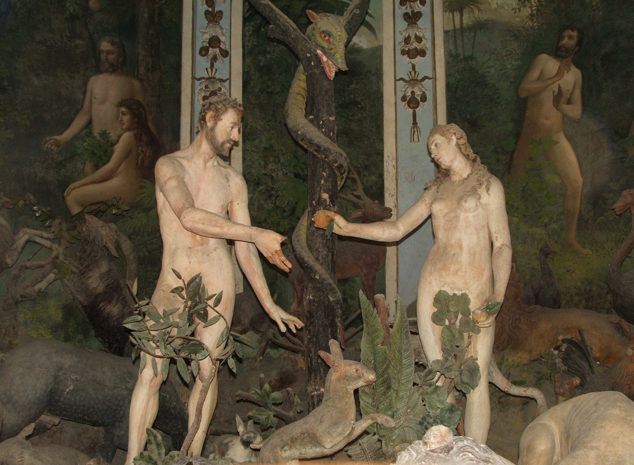 Sacro Monte di Varallo, Varallo, Italia - Cappella I, Il peccato originale - statue policrome di Adamo ed Eva di Jan de Wespin il Tabacchetti (1597-98); affreschi de i Fiamminghini (1604-05)